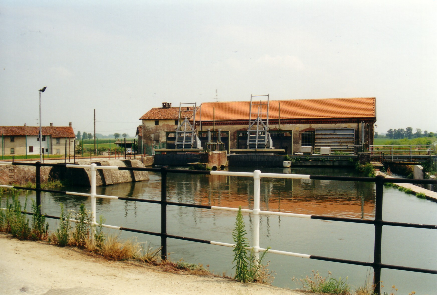 Centrale Idroelettrica di Santa Maria di Bagnolo